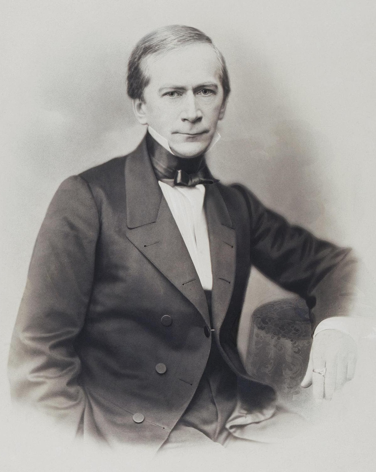 Портрет Модеста Андреевича Корфа. Фотография: отпечаток на солёной бумаге.